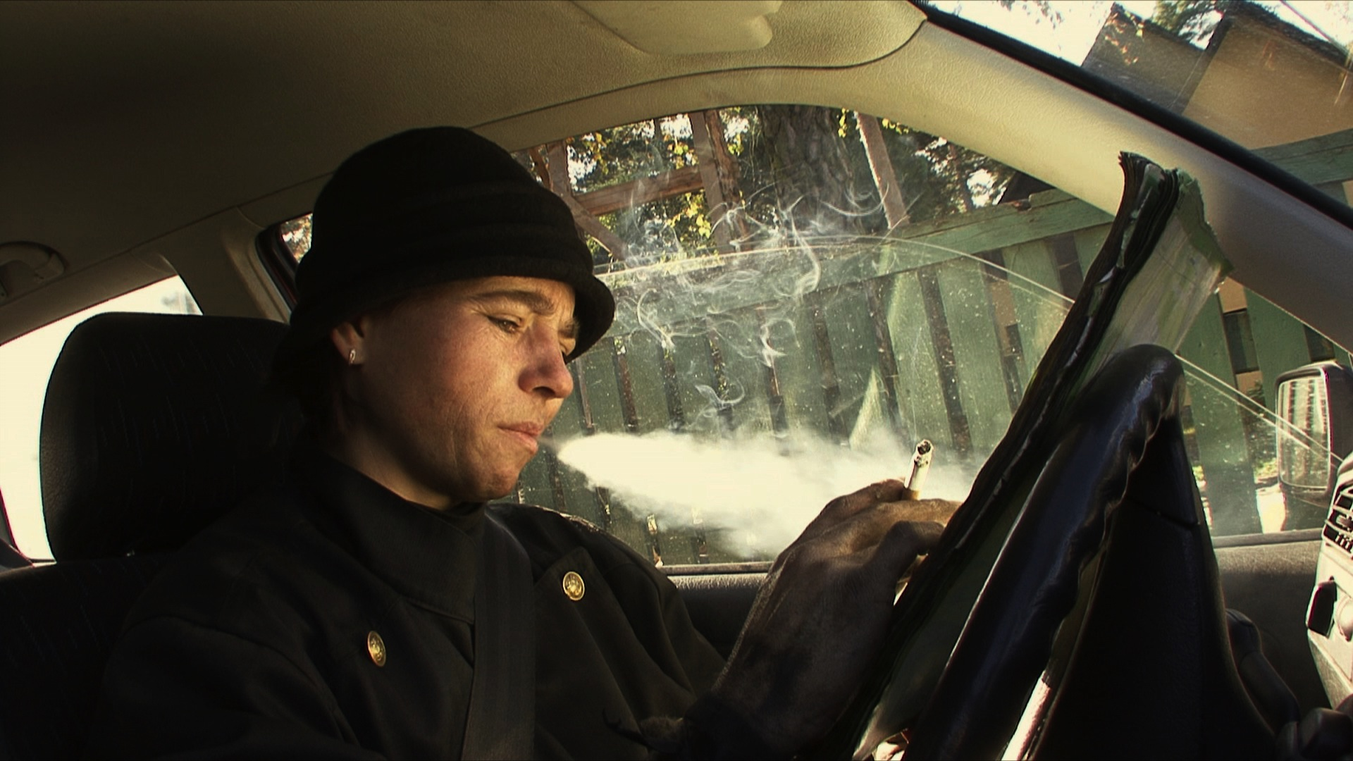 Peategelane Francesko